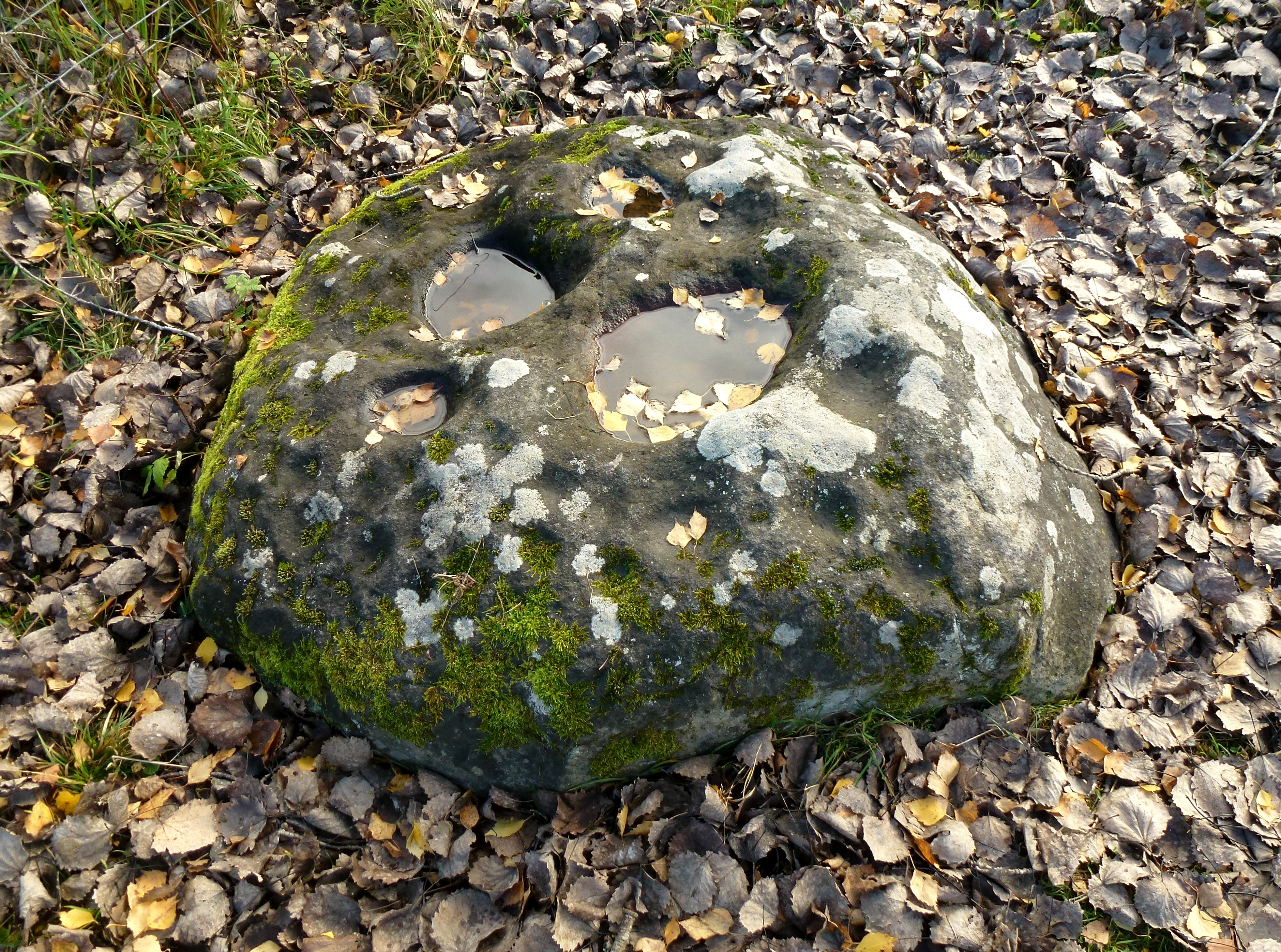 Söderby fornområde, vattenfyllda skålgropar